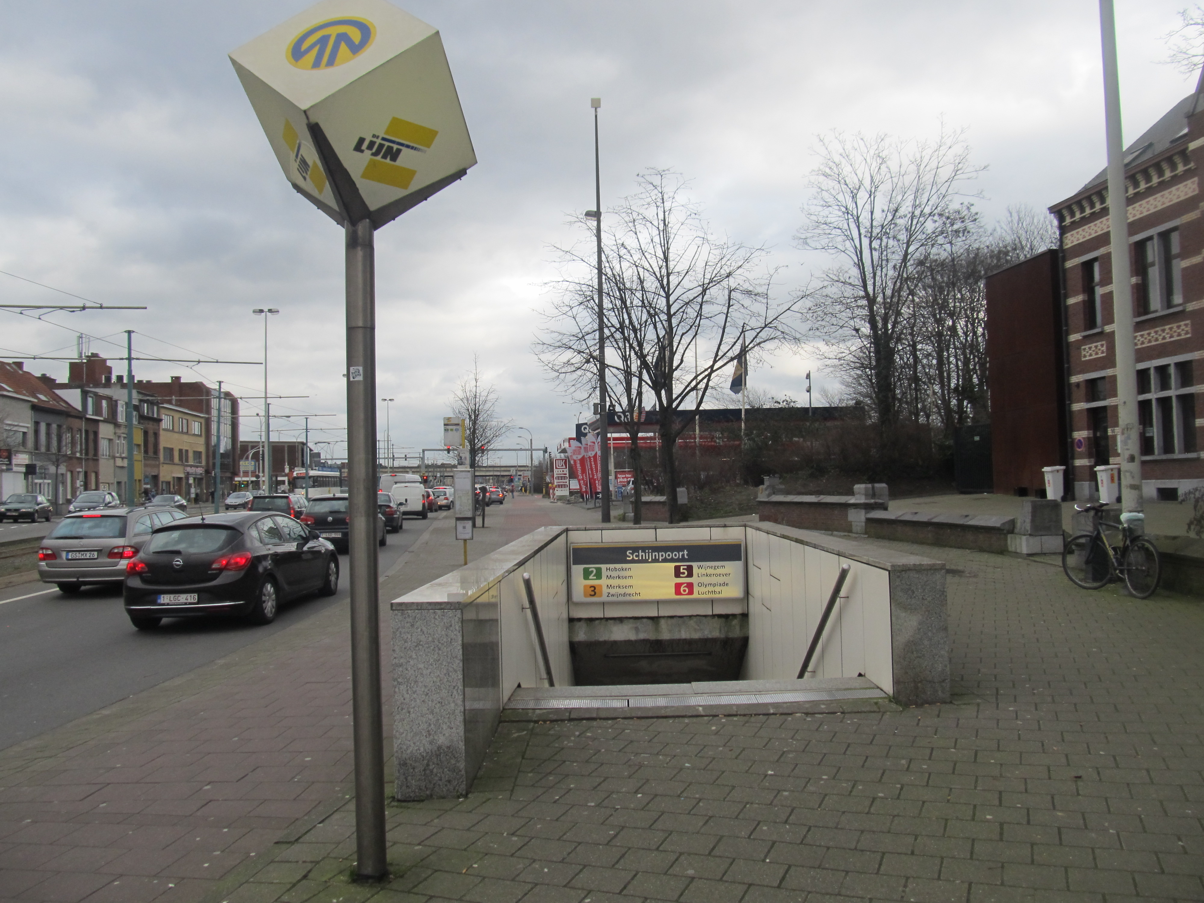 Gura de premetrou Schijnpoort.